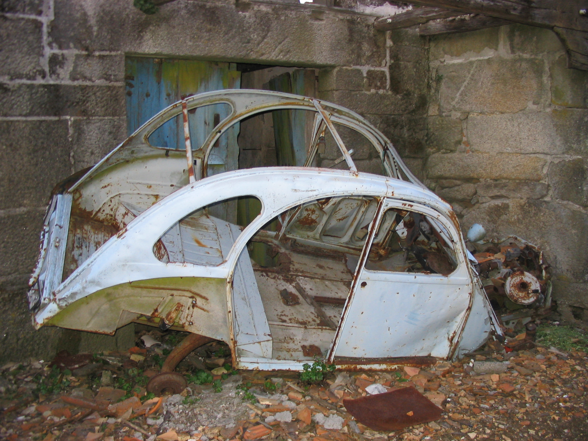 Restos dun dous cabalos nun albergue de Ourense'Restos dun dous cabalos'